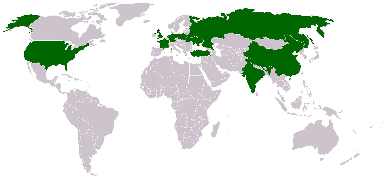 Staaten mit den größten Anteilen an der Weltproduktion von Kartoffeln GNU FDL St. Krekeler